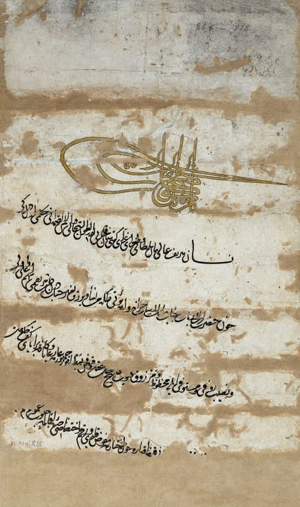 Ernennungsurkunde (Berat) Sultan Bayezids II. für Hadım Ali Paşa zum Beylerbey von Rumeli